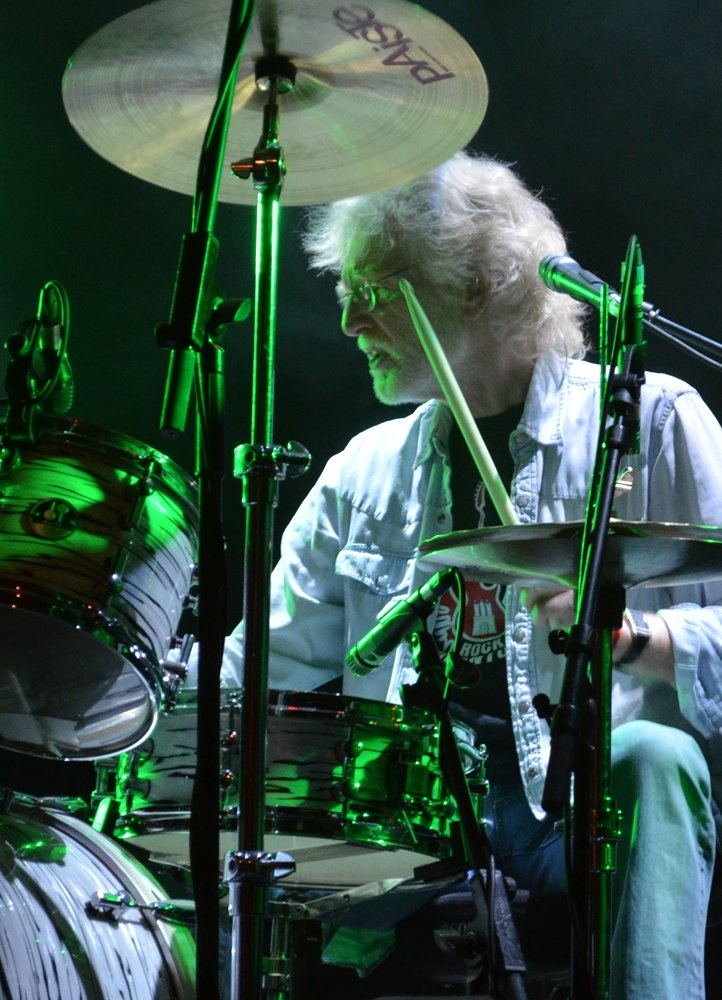 Profi-Schlagzeuger Fritz Graack - Knust Hamburg - April 2012